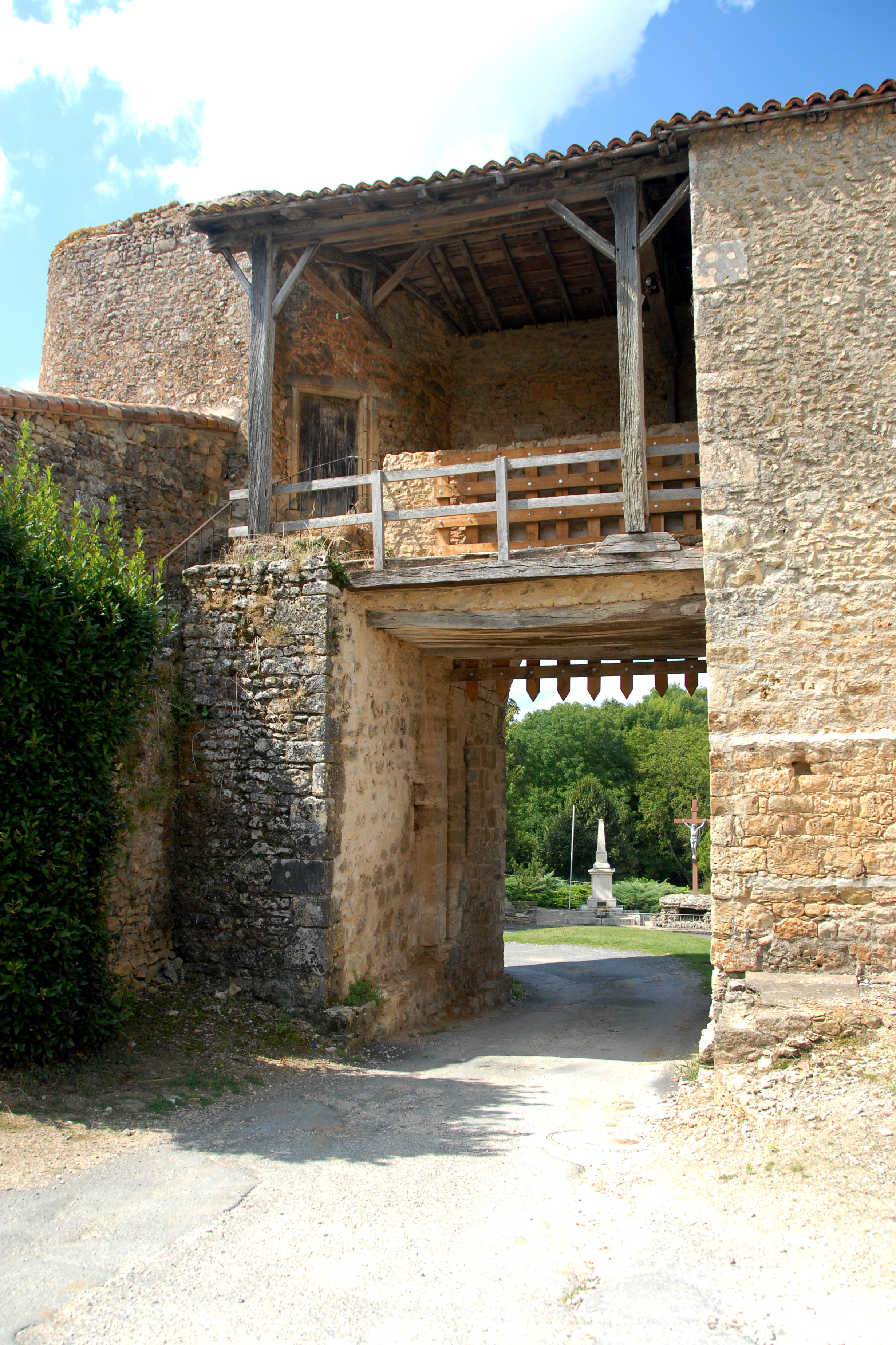 Château-Larcher, Hauptportal Innenseite